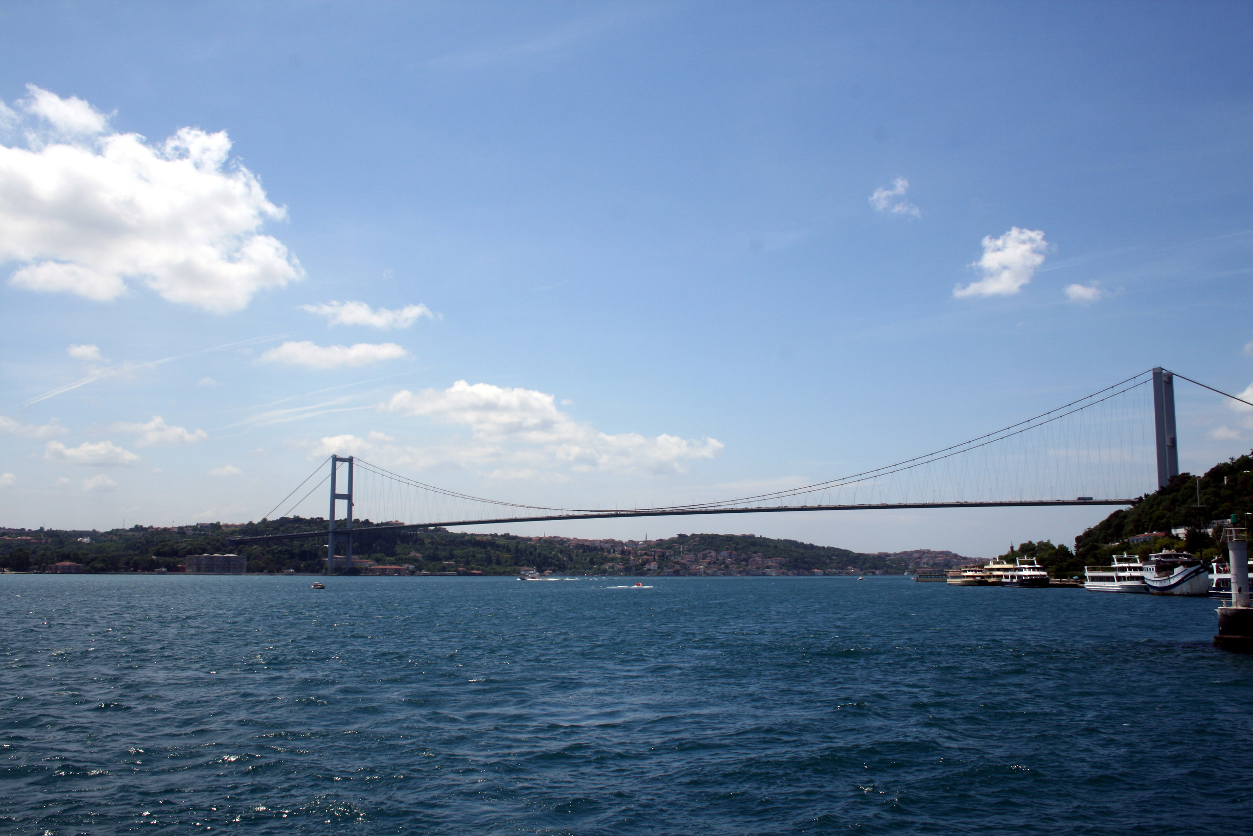 Pont du Bosphore au dessus du Bosphore